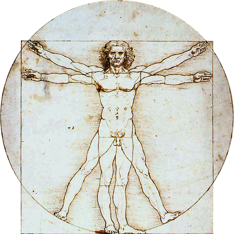 Vitruvian Man